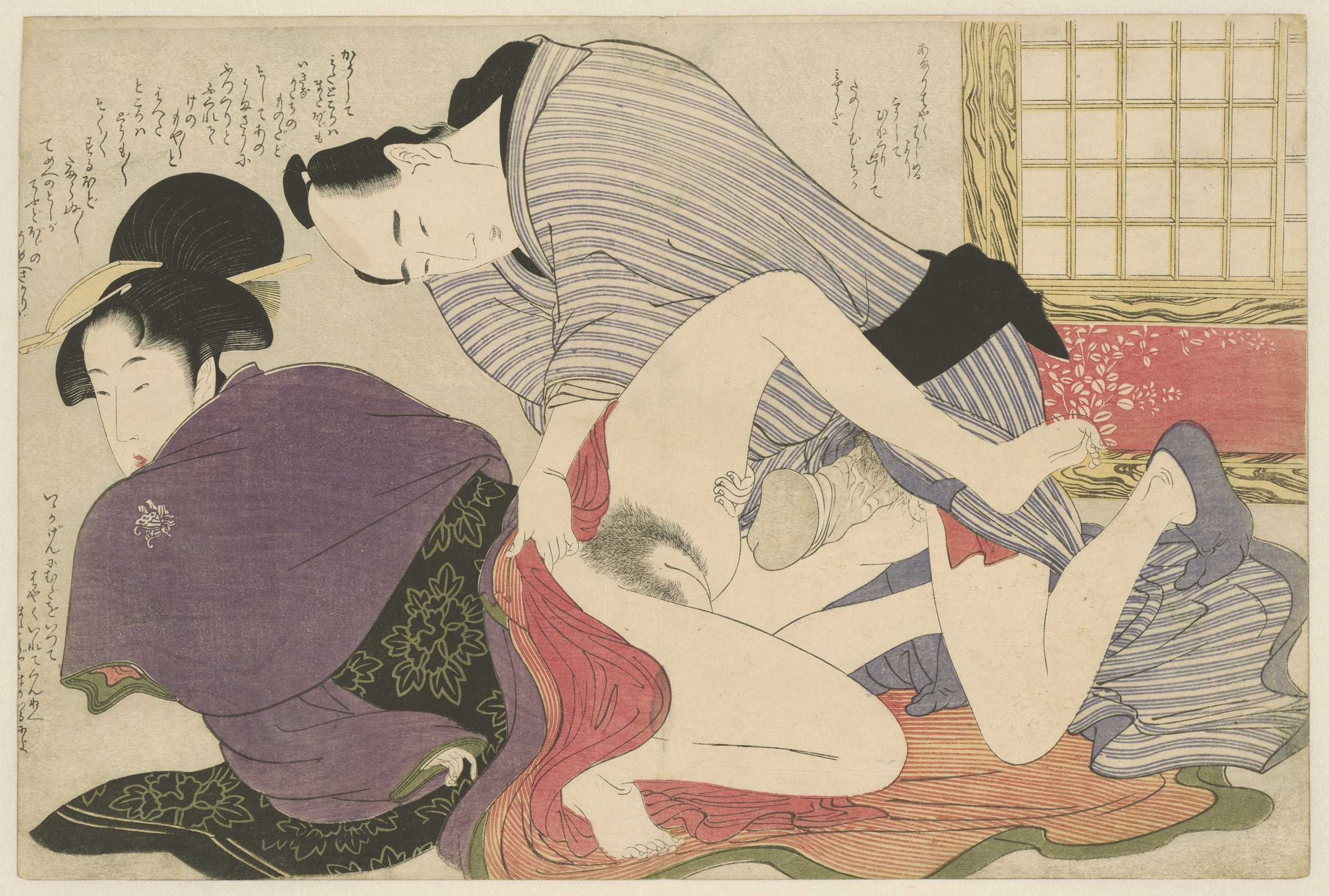 Man in blauw-wit gestreepte kimono en sokken aan, ontbloot het onderlichaam van een geisha om haar te kunnen penetreren. Een vrijstaand kamerscherm in de achtergrond. Achtste van dertien prenten uit het album Negai no itoguchi (ook wel vertaald met: The prelude to desire). Label Line: Kitagawa Utamaro (1753 - 1806), 1799, kleurenhoutsnede; lijnblok in zwart met kleurblokken Collection: prenten; Japan (collectie)